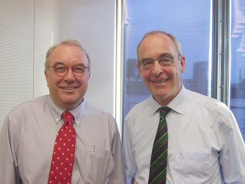 Die SPD-Bundestagsabgeordneten Uwe Beckmeyer (auf dem Bild links) und Volker Kröning (auf dem Bild rechts) bei einer Veranstaltung der SPD-Bundestagsfraktion am 26.06.2009